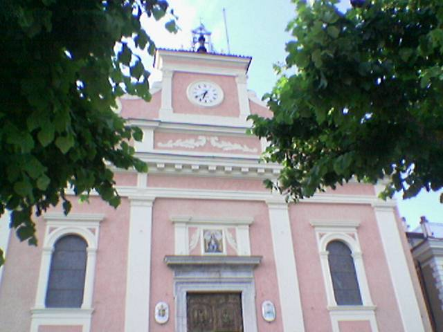 Foto da me scattata nel luglio 2004.